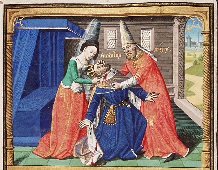 Cité de Dieu - Den Haag MMW 10 A 11 Fol. 25r, Book 1, 20 Gyges kills king Candaules at the queen's order (1st of 2) Maître François (illuminator)